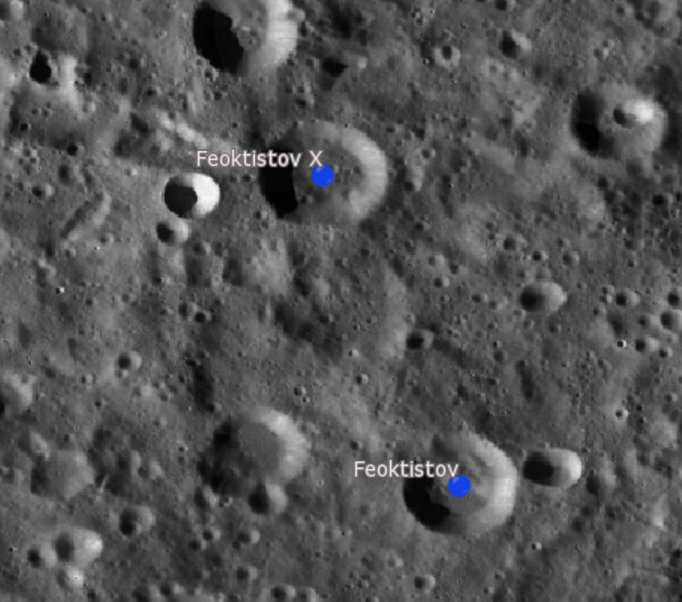 Cráter lunar Feoktistov. Cráteres satélite. (Imagen LRO)